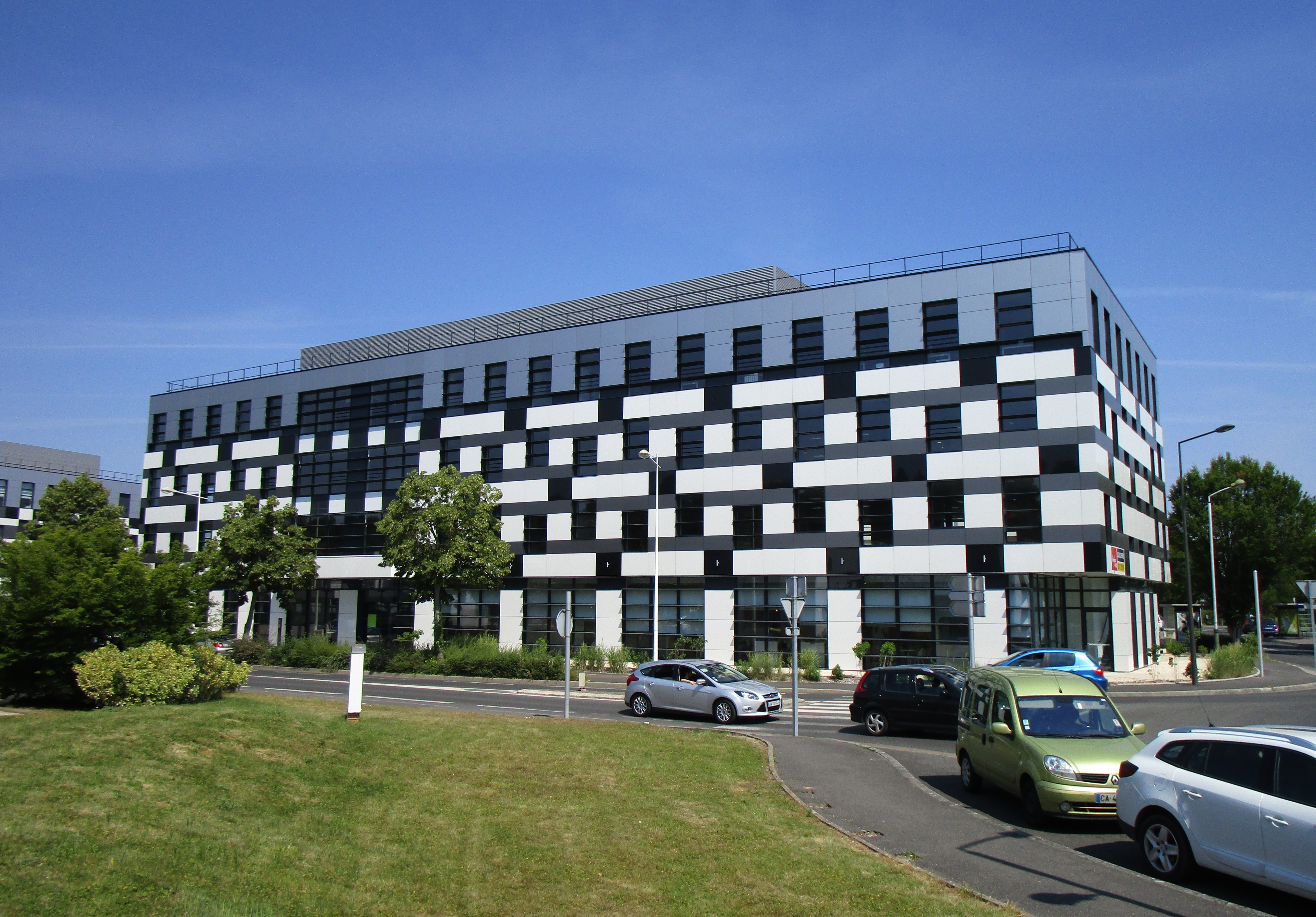 Immeubles de bureaux Campus, dans le quartier des Deux-Lions à Tours, construits en 2016.